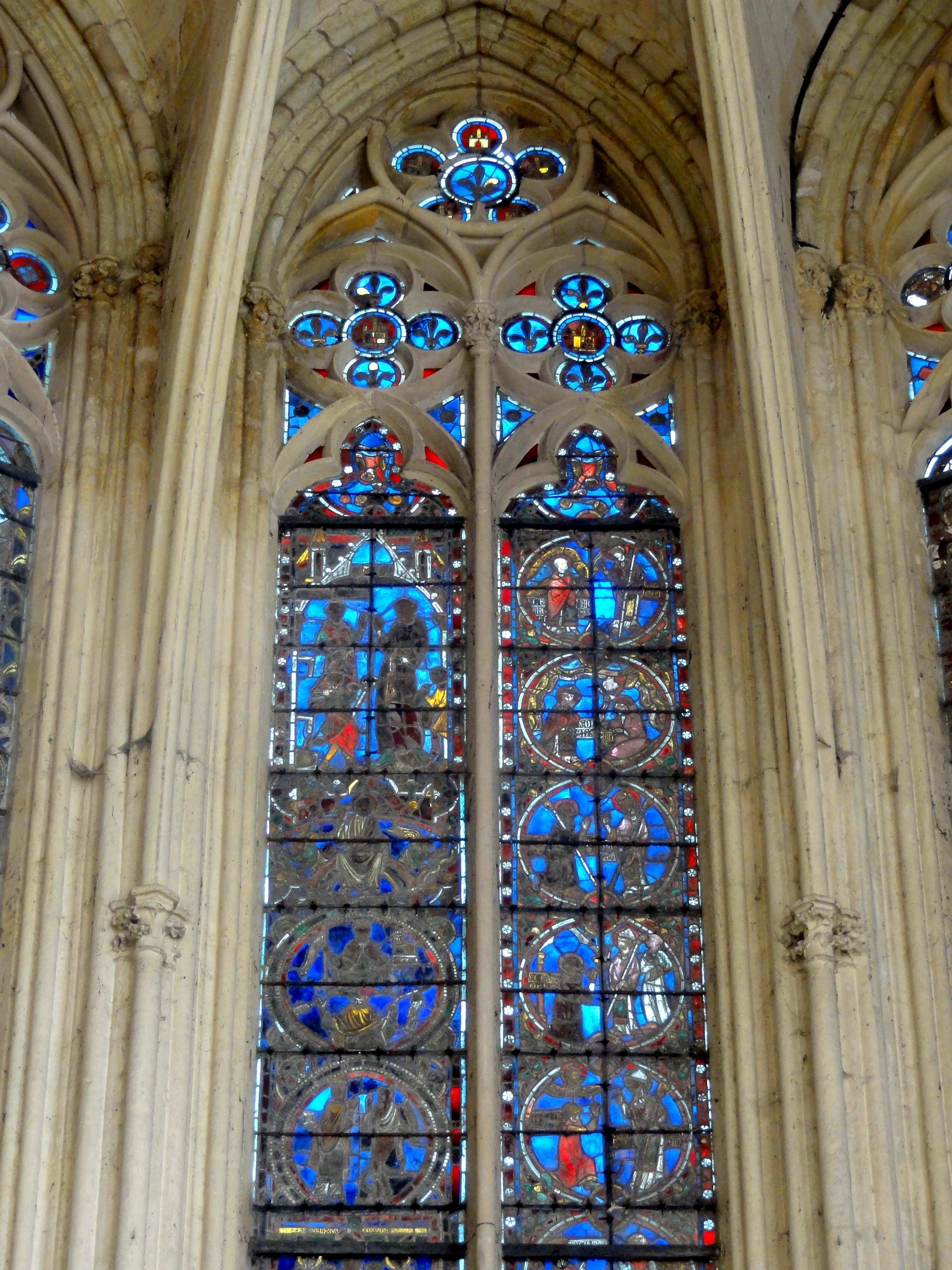 Vitraux classés de l'abside de la chapelle de la Vierge (Sainte-chapelle) du XIIe, XIIIe et XVIe siècle - voir le titre du fichier.